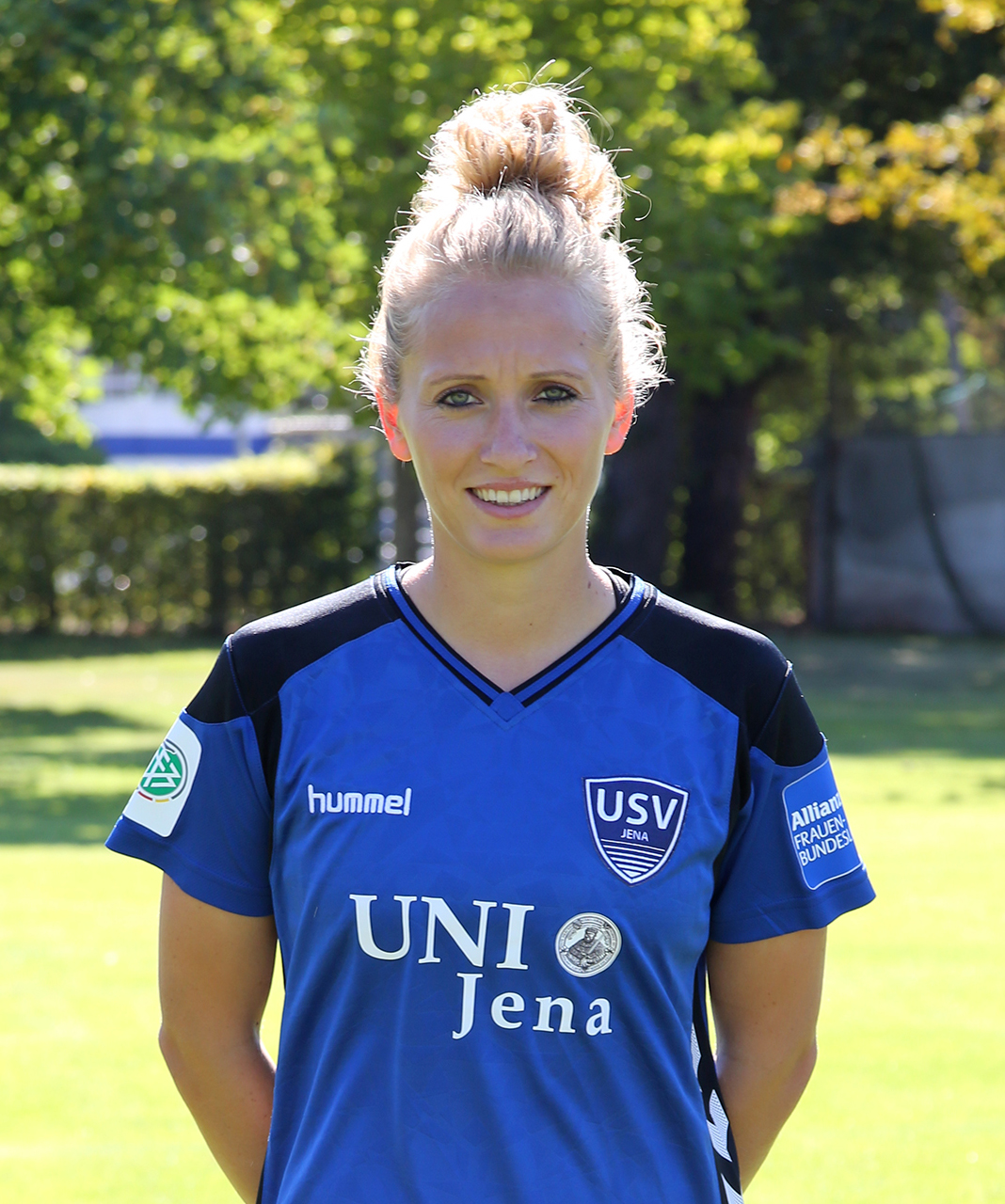 Karoline Heinze bei der Teamvorstellung des FF USV Jena